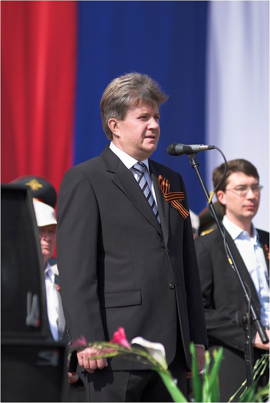 Мэр Тольятти Анатолий Пушков на параде в честь Дня Победы, Тольятти, Россия